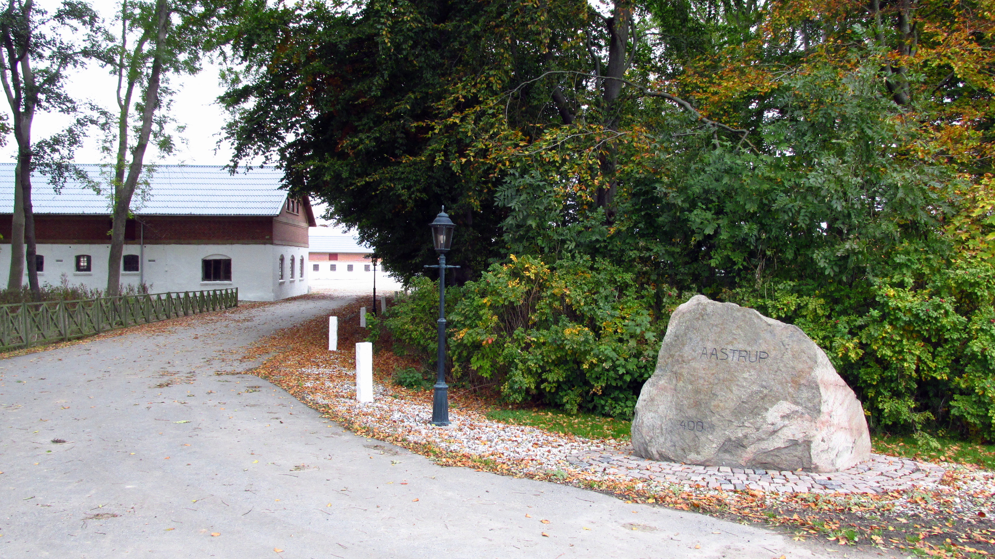 Indgangen til Aastrup Hovedgaard, Hjørring